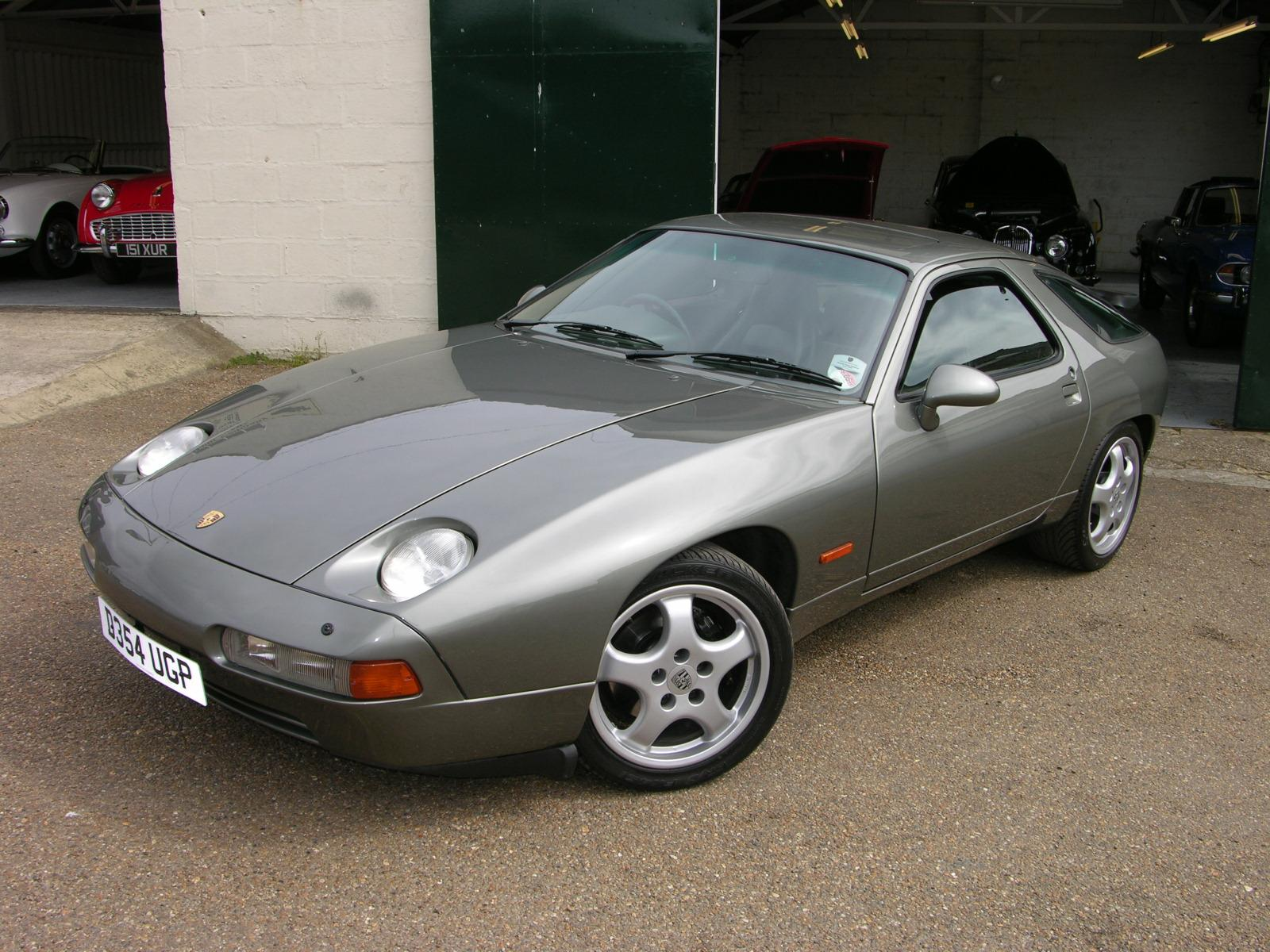 1987 Porsche 928 S4